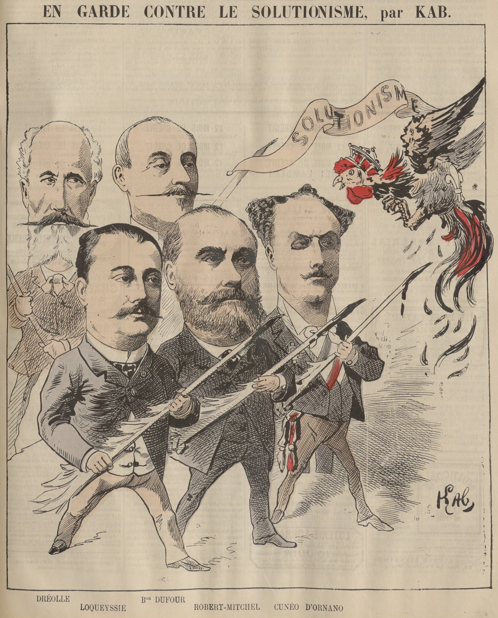 "En garde contre le solutionisme".